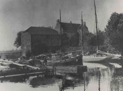 Die Osterburg von Oldersum um 1910.